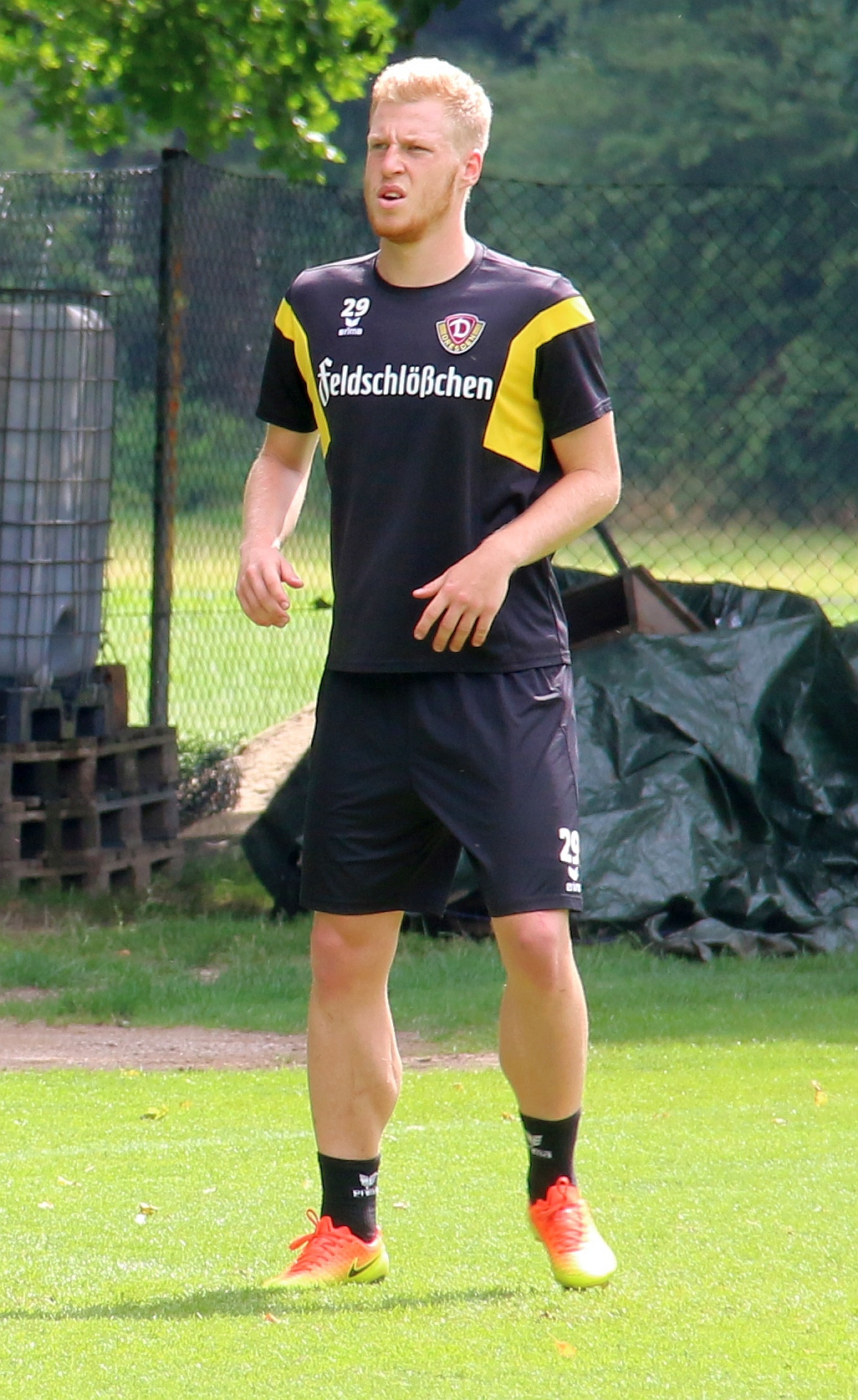 Robin Fluß (SG Dynamo Dresden)